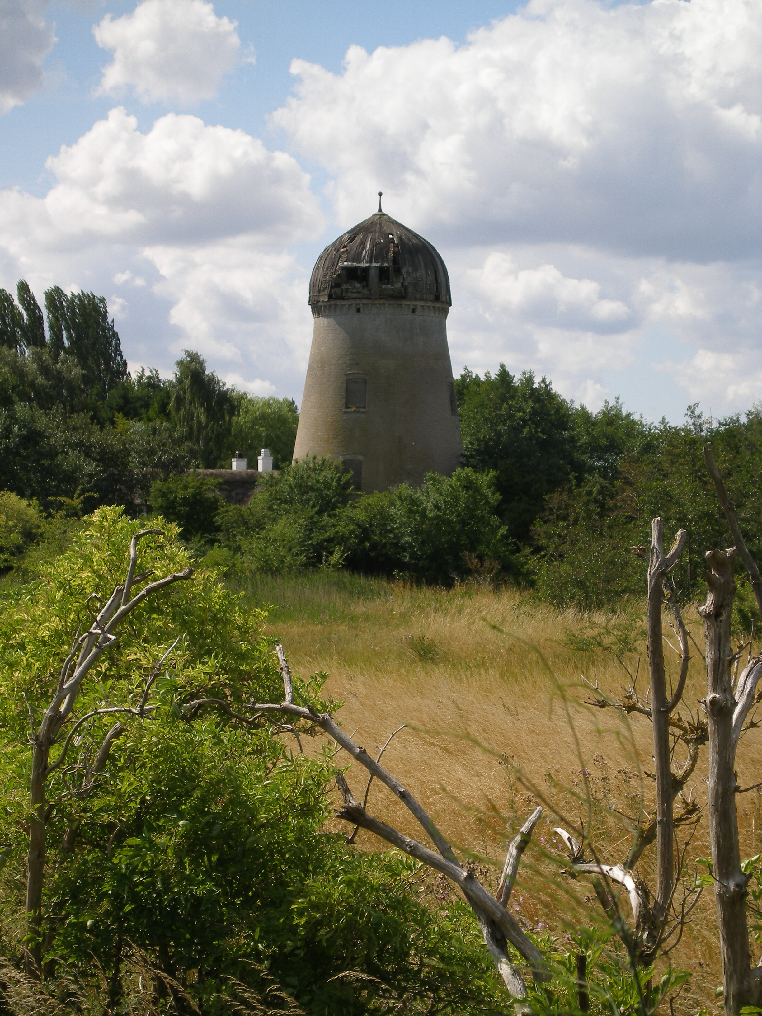 Bogø Mølle, en gammel hollandsk pumpemølle ved Fjordmarken Inddæmning nær Odense